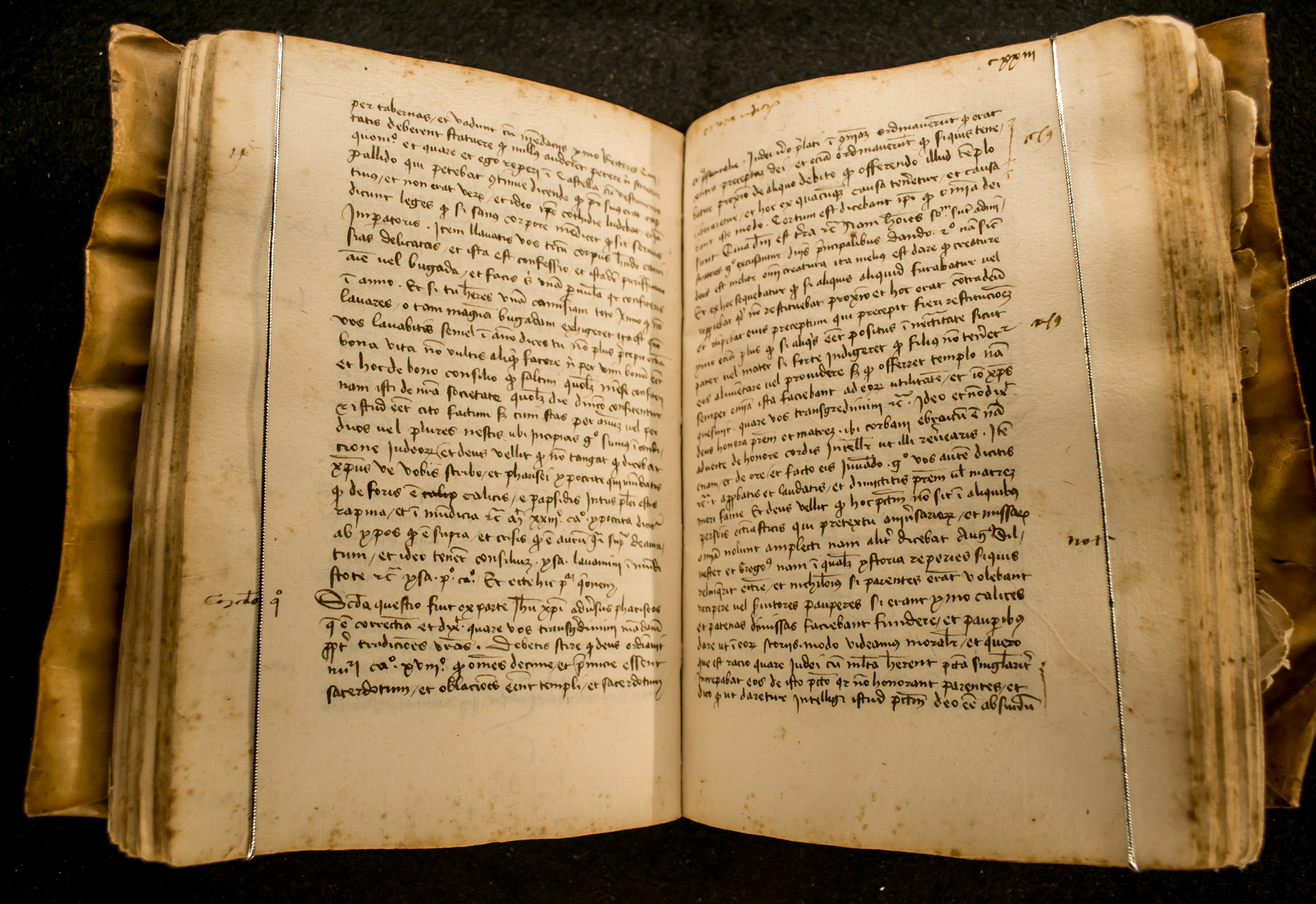 Colección de sermones de cuaresma y otros de San Viente Ferrer. Manuscrito de 1435, conservado en Ayora.